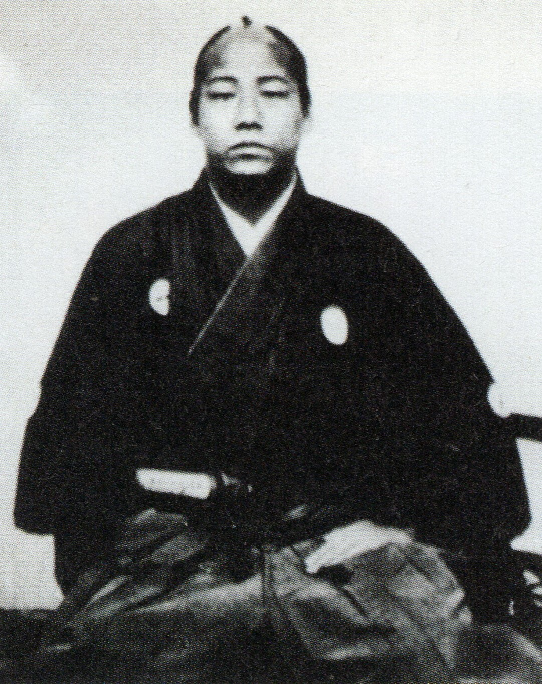 谷万太郎の肖像写真。